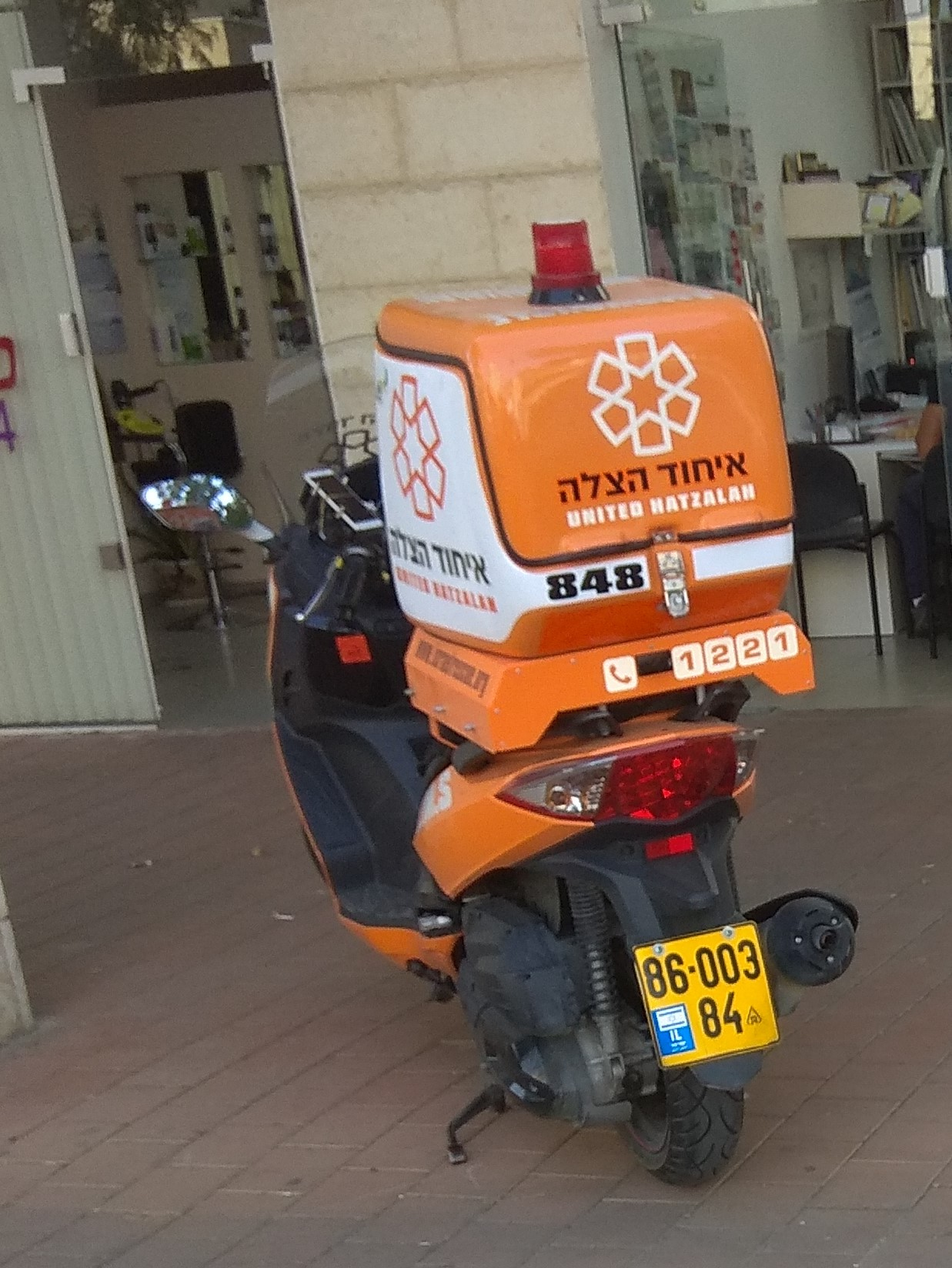 קטנוע של הארגון